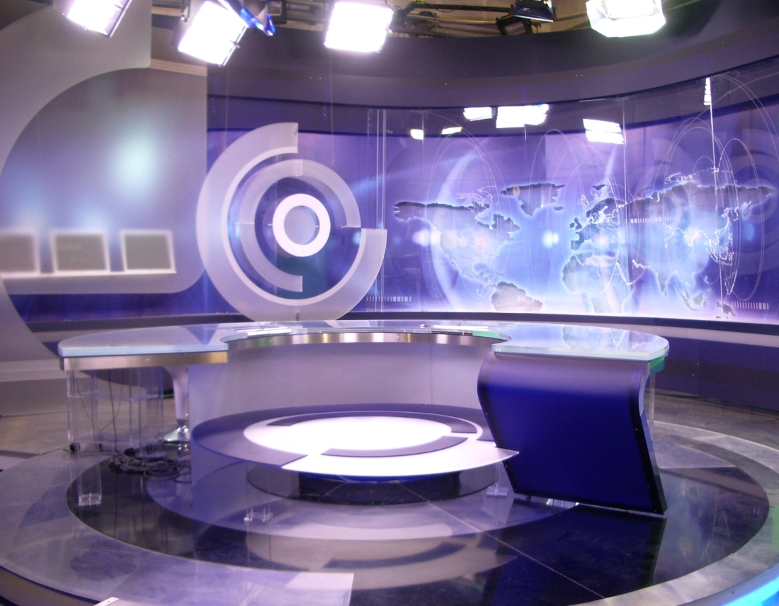 Hrvatska radiotelevizija, Zagreb